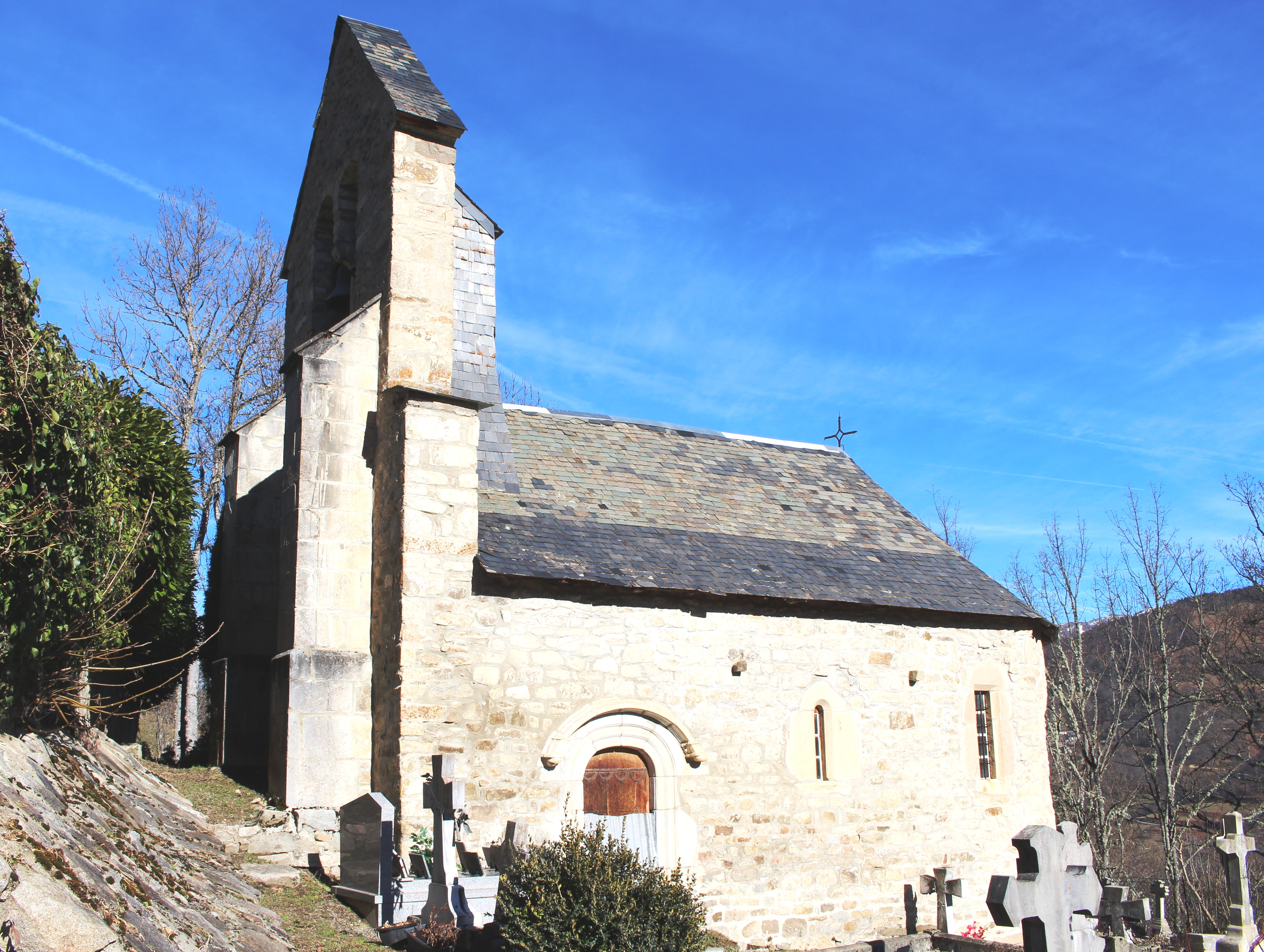 Église Saint-Germé d'Ilhan (Hautes-Pyrénées)